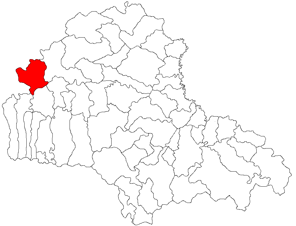 Categorie:Hărţi ale judeţului Braşov